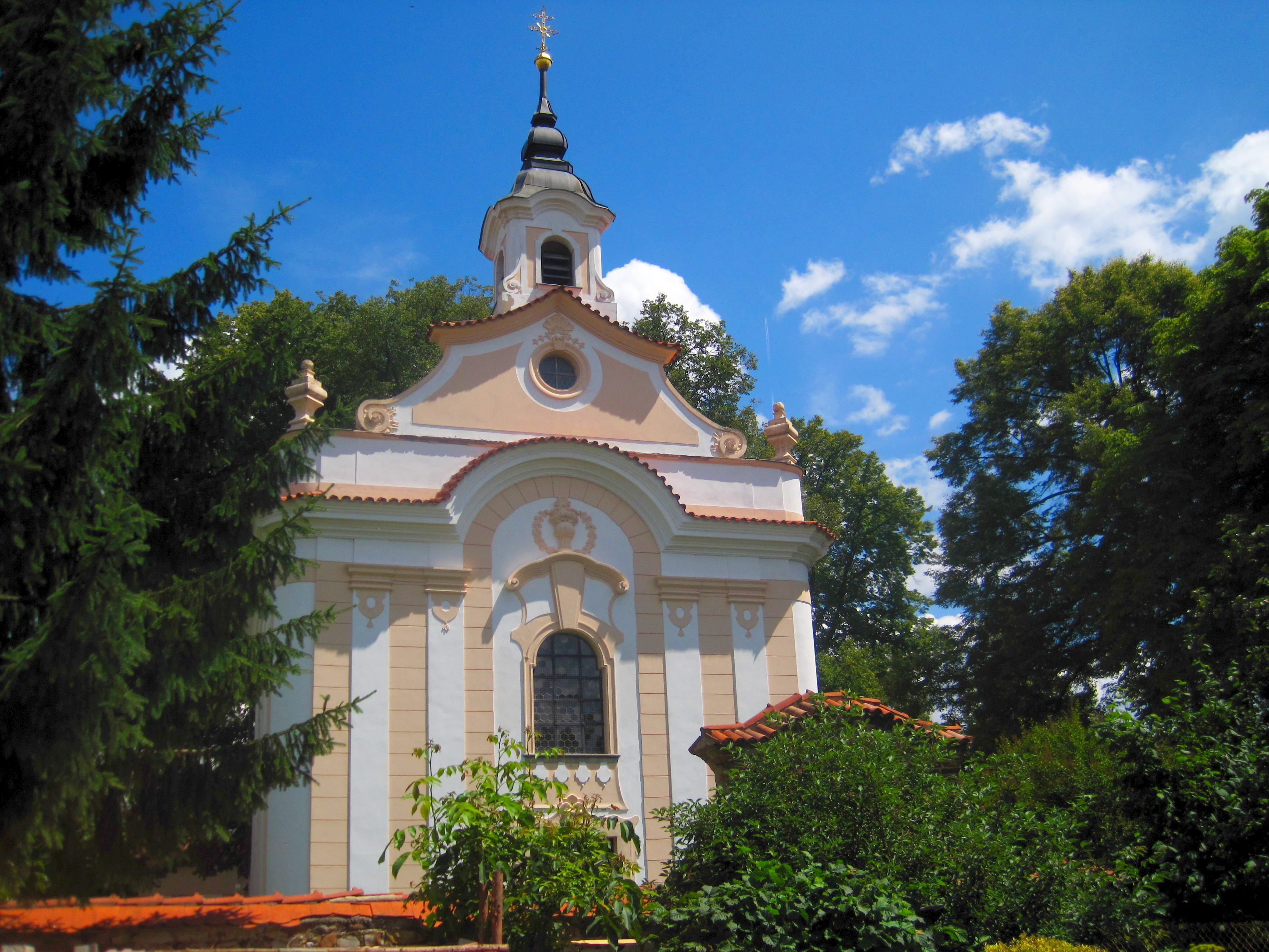 Kostel svatých Šimona a Judy, náves, Skřipel.